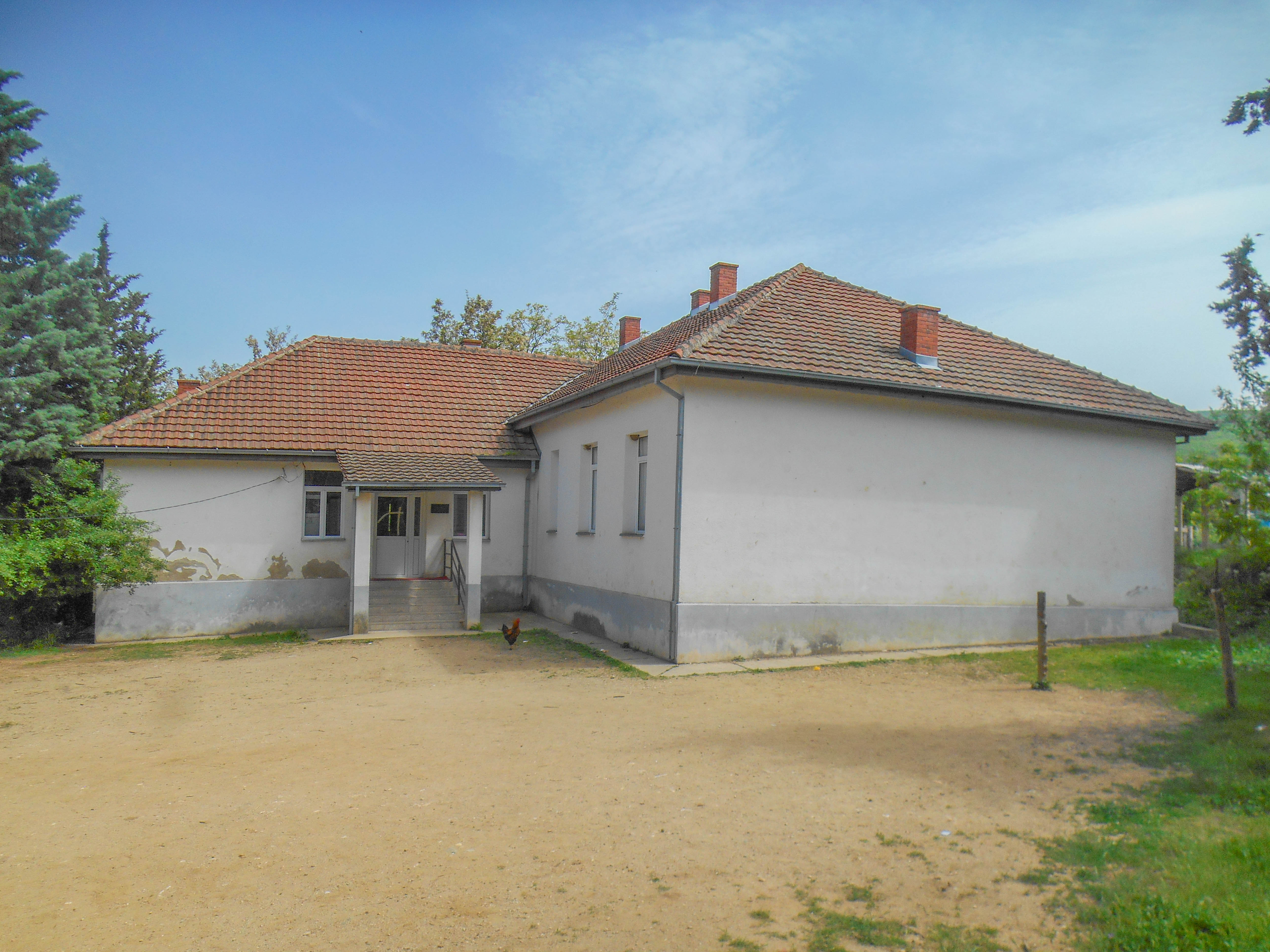 Основно училиште „Гоце Делчев“ - Дукатино